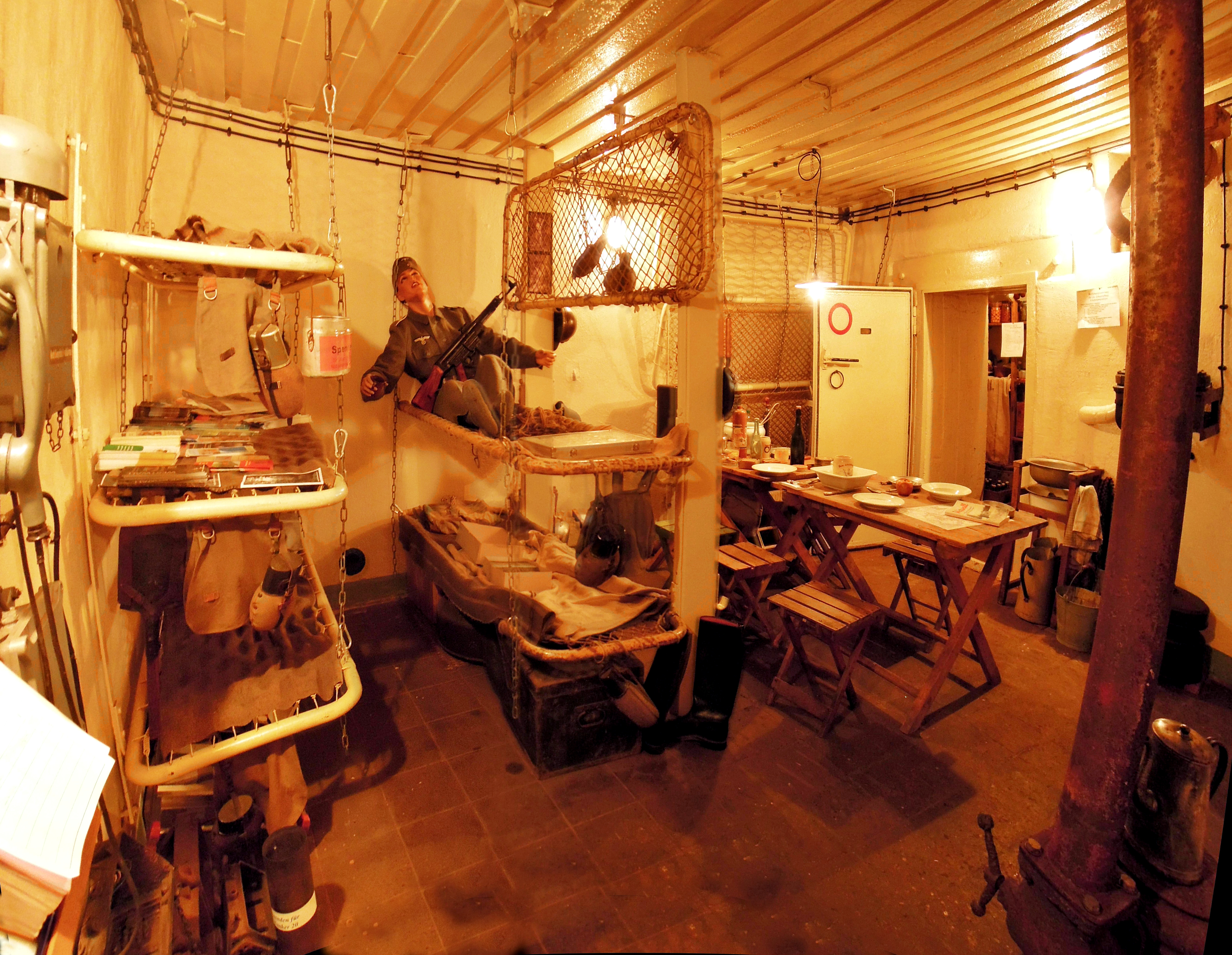 Mannschaftsraum des Bunkers